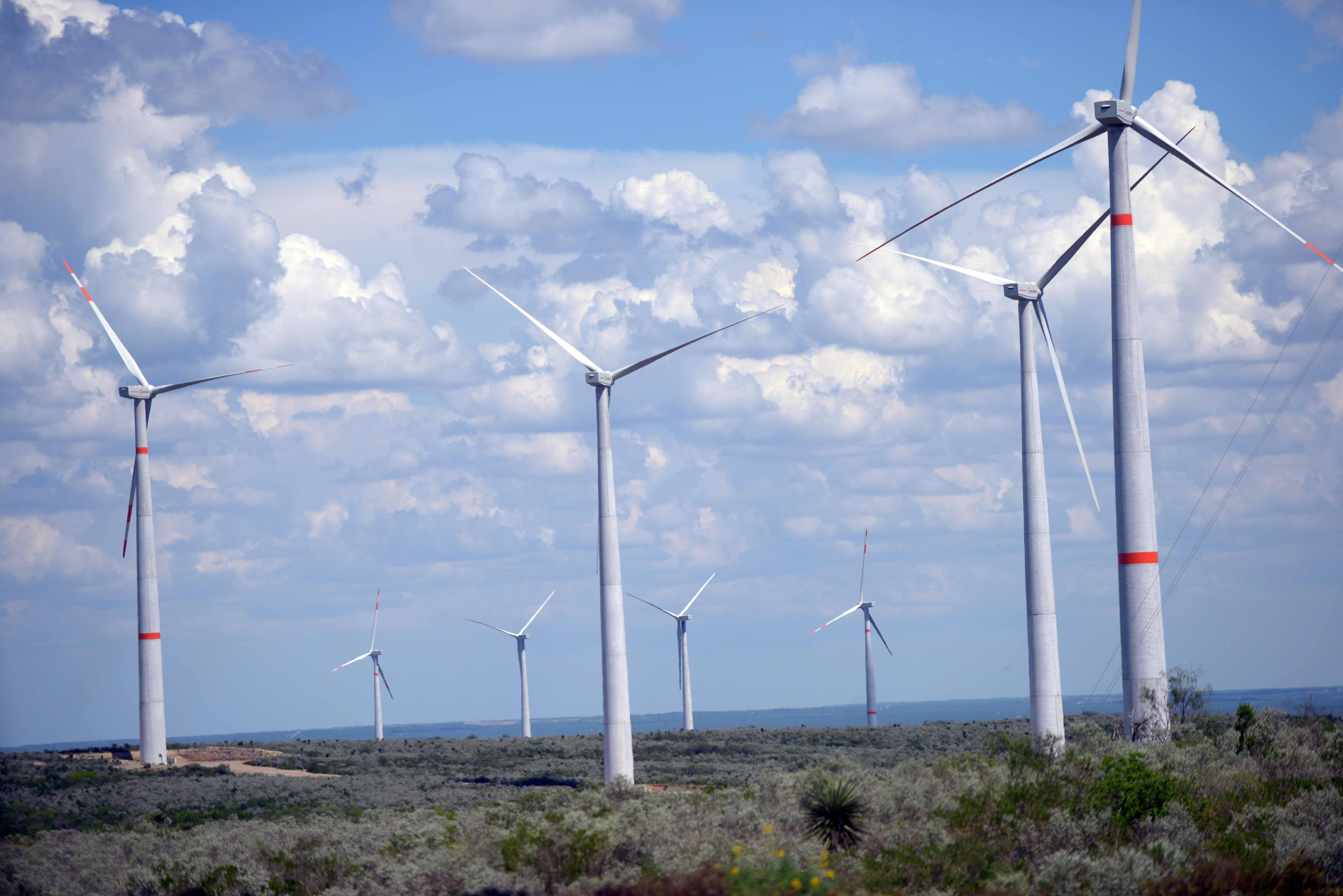 Wind turbines (84 in total) at the Parques Eólicos Ventika (Ventika I and Ventika II) located in General Bravo, Nuevo León. The USD$650 million wind-power complex has the capacity to produce 252 megawatts per hour and can meet the electricity demand of some 630,000 homes. (Source) El Presidente Enrique Peña Nieto​ encabezó la inauguración de los Parques Eólicos Ventika , en donde destacó el compromiso del Gobierno de la República con el respeto al medio ambiente y el impulso a la generación de energías limpias, como lo establecen la Reforma Energética y el marco jurídico en la materia.